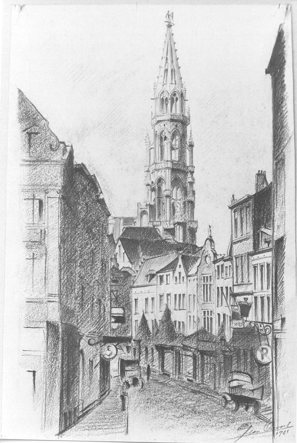 Marché aux Fromages, à Bruxelles